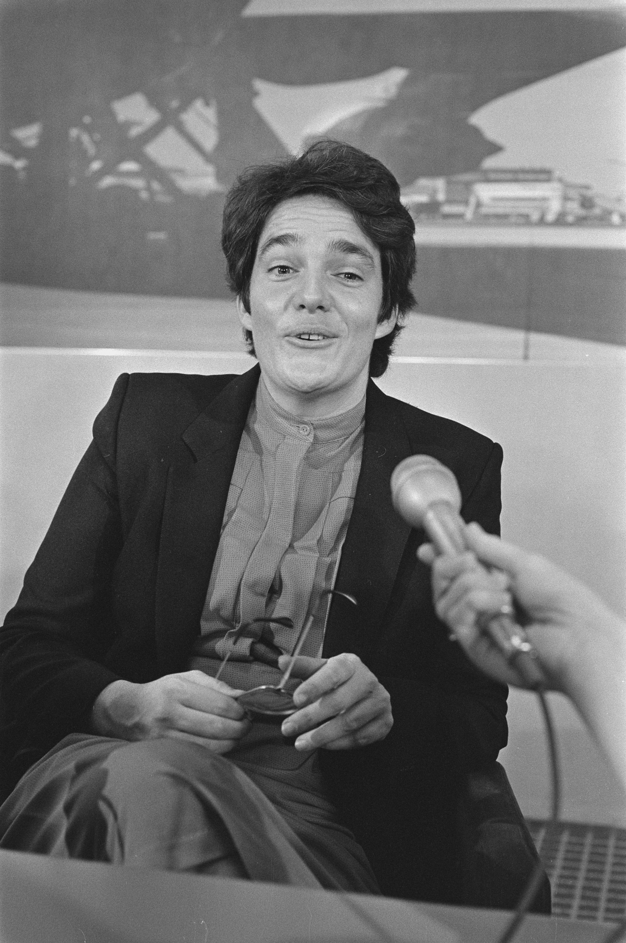 Kathy Satchwell, advocaat van Klaas de Jonge, op Schiphol